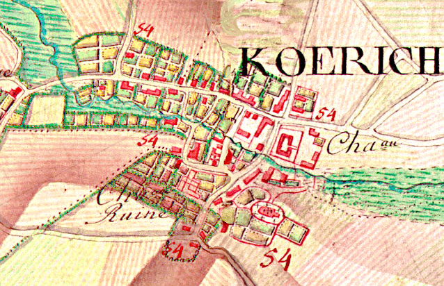 D'Duerf Käerch op der de Ferrariskaart (géint 1775). Den Extrait weist d'Giewelerbaach a wou déi zwee Schlässer stoungen: am Osten d'Gréiweschlass an am Westen d'Ruine vum Fockeschlass. D'Kierch ass südlech an der Mëtt dertëscht.